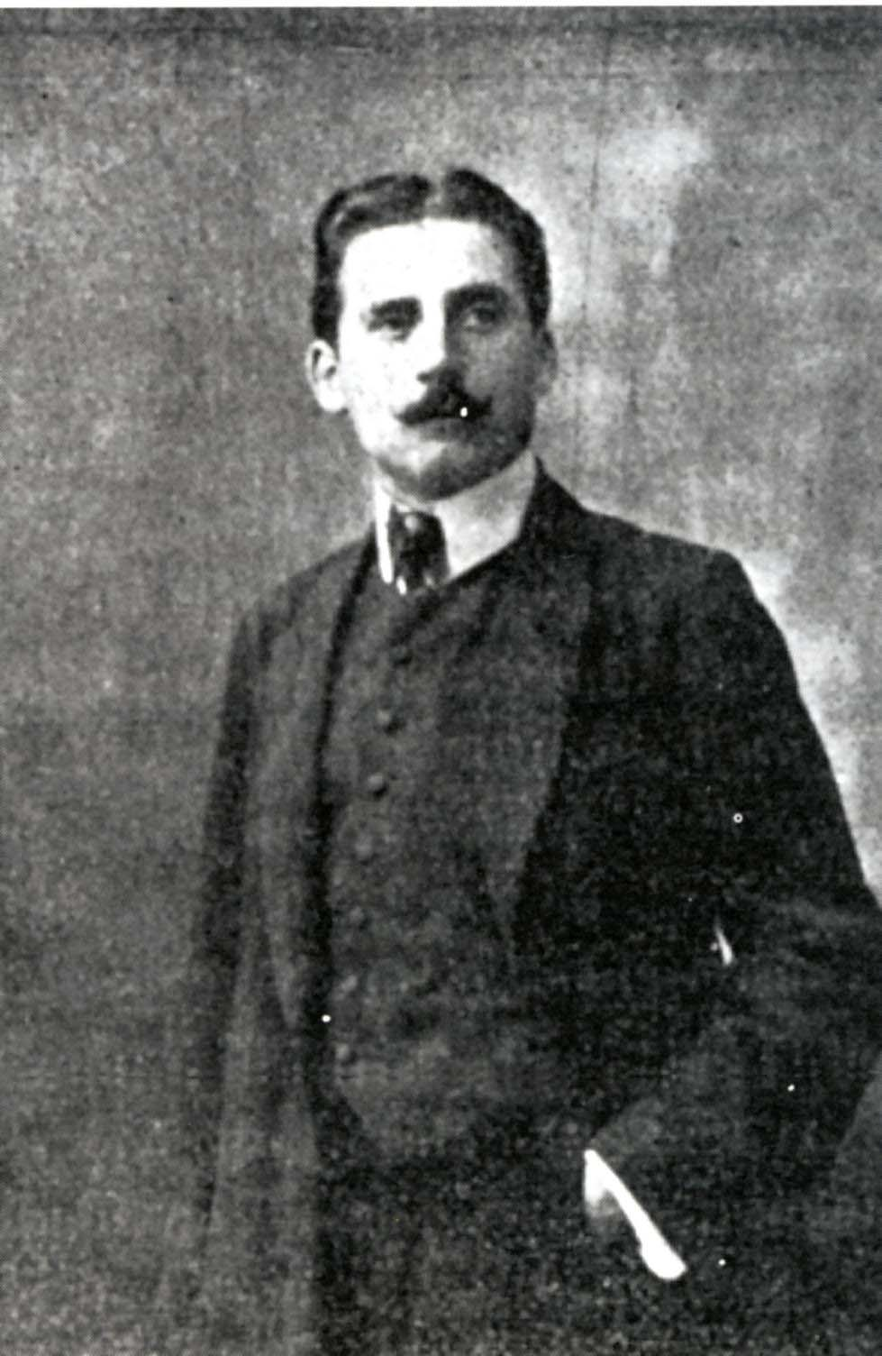 Ritratto di Ernesto Aurini